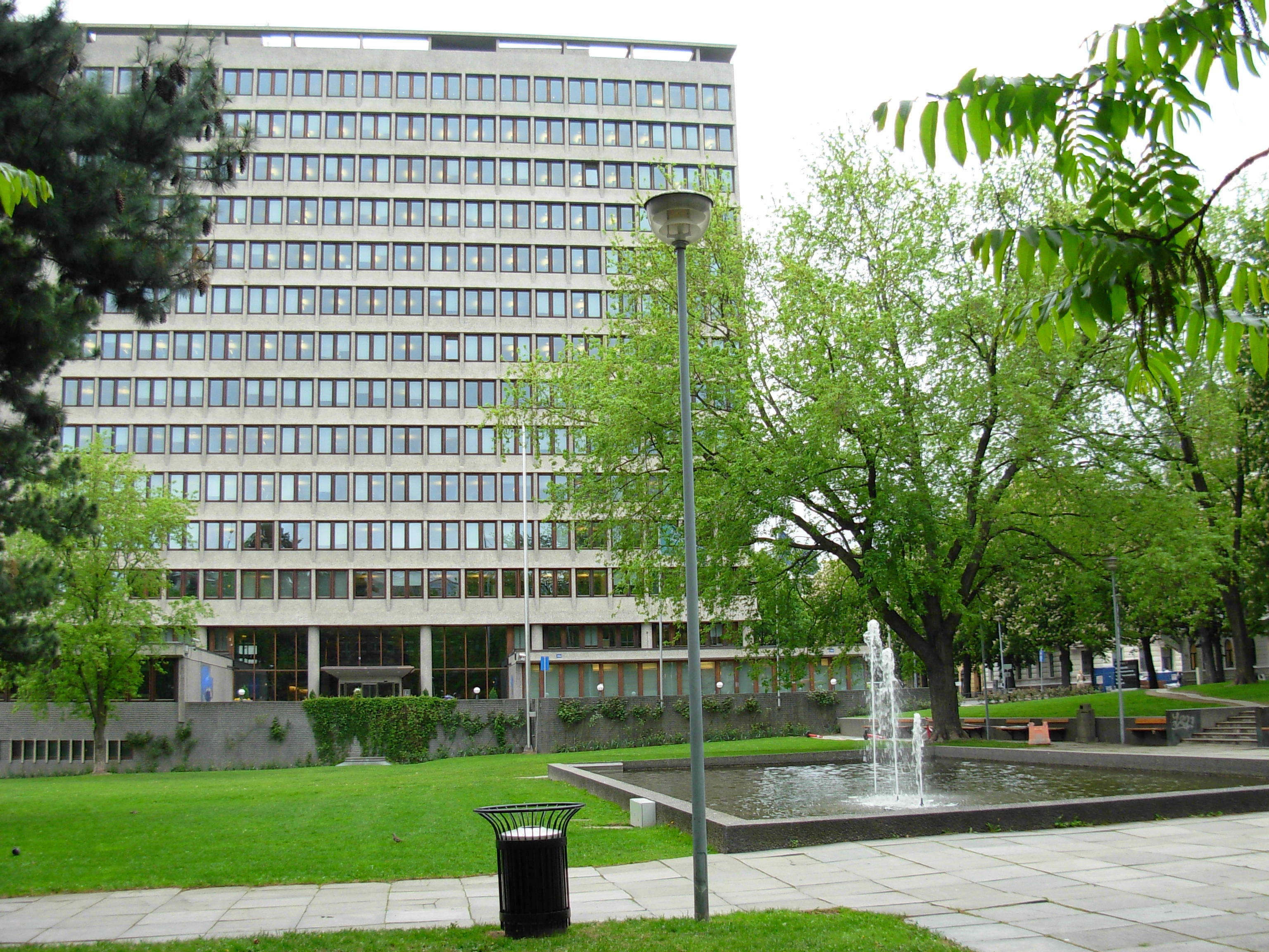 Hydroparken, Oslo